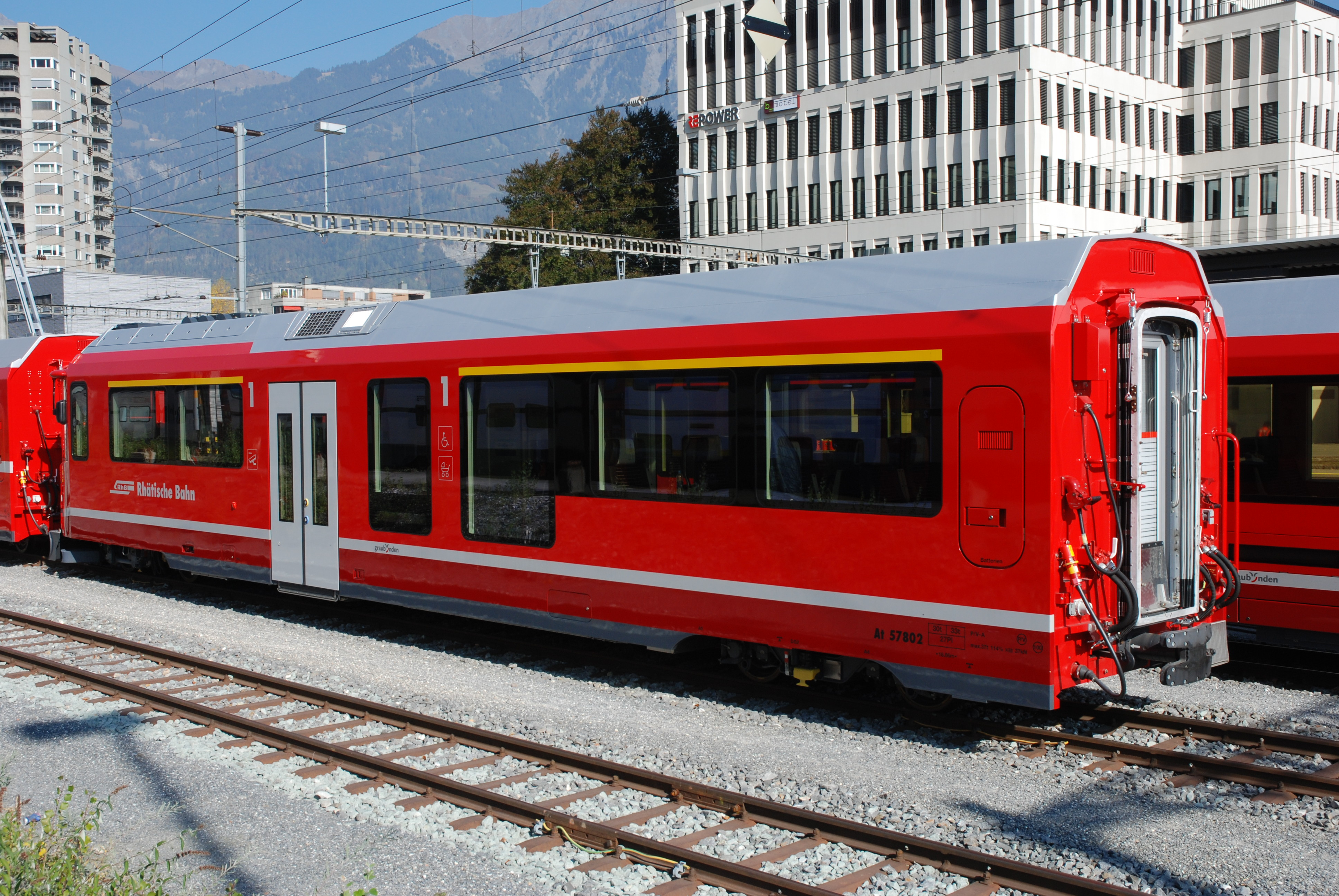 RhB Steuerwagen At 578